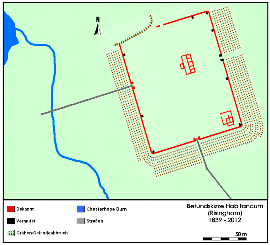 Befundskizze des Kastell Habitancum/Risingham, GB